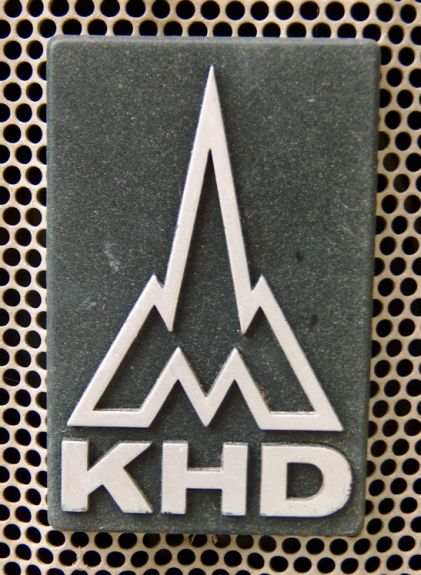 KHD-Logo am Kühlergrill eines Deutz-Fahr-Traktors